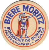 Sous-bock de la brasserie Moritz Source: photo perso Rémi Stosskopf